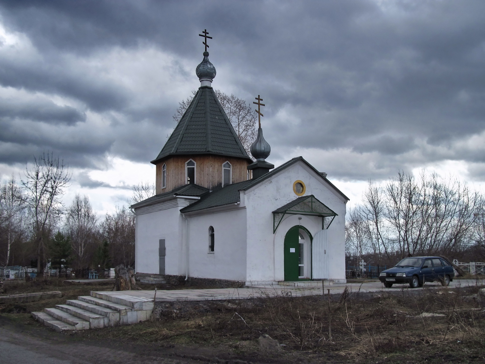 Приход Воскрешения Праведного Лазаря